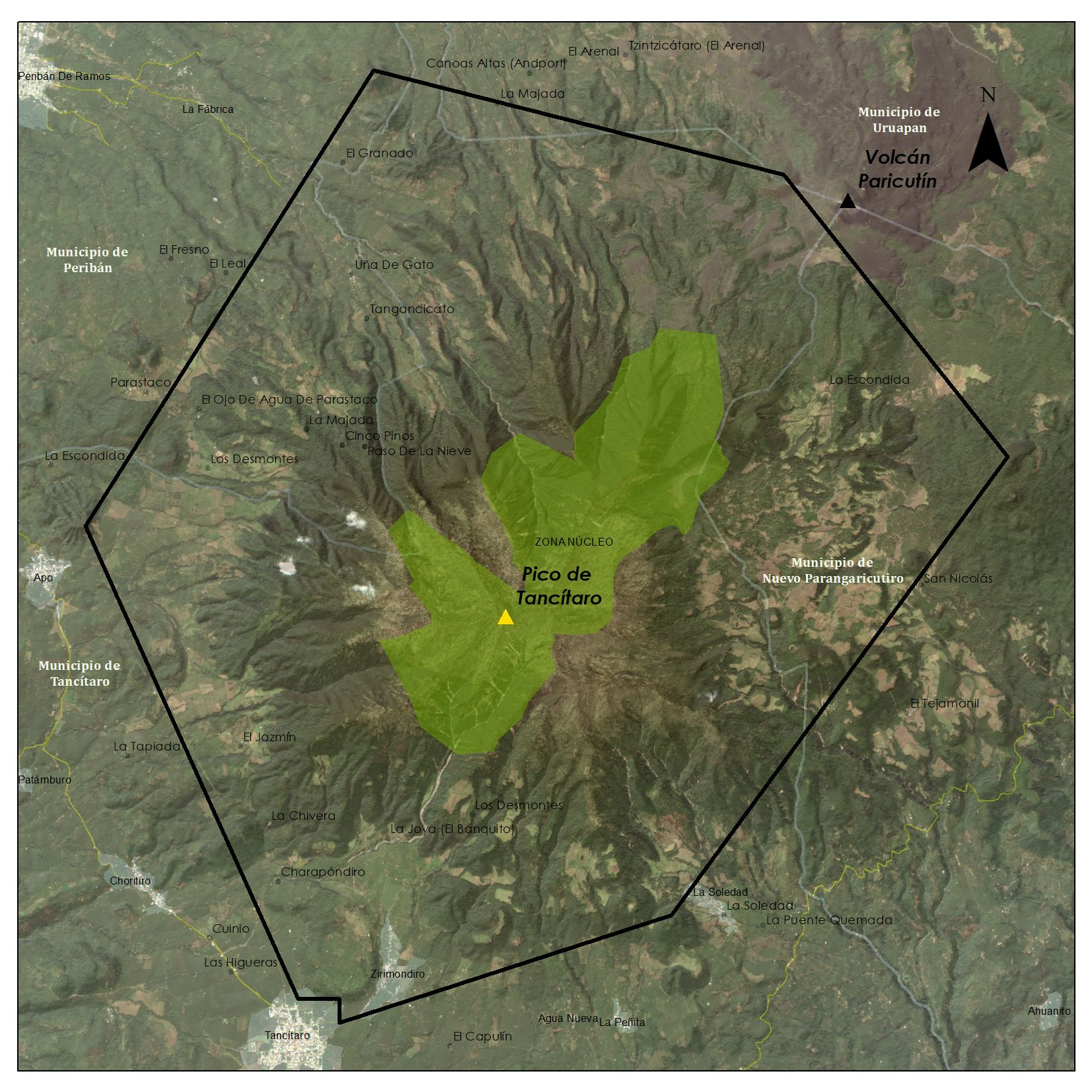 Polígono del APFF Pico de Tancítaro donde se identifica su zona núcleo, así como las principales localidades rurales y urbanas que le circundan.